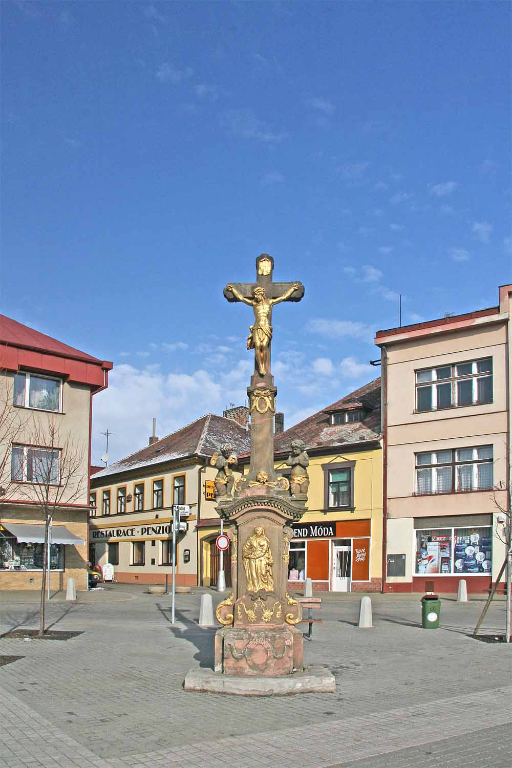 Kamenná Boží muka na náměstí v Holicích